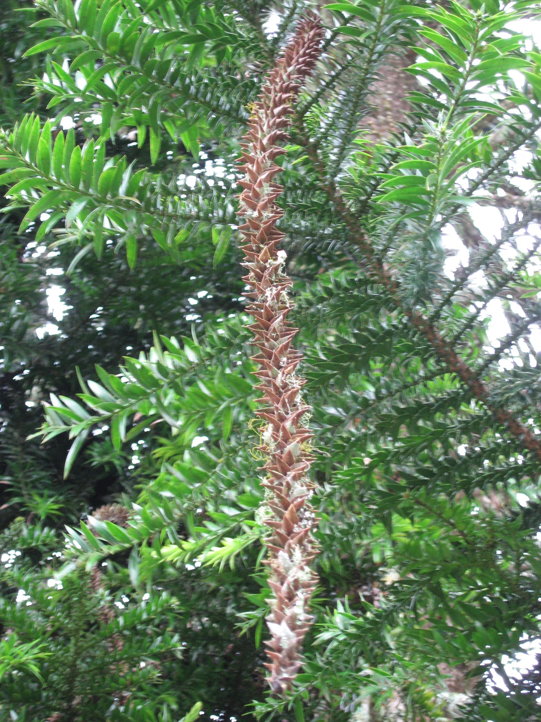 Araucaria bidwillii in Kebun Raya Bali